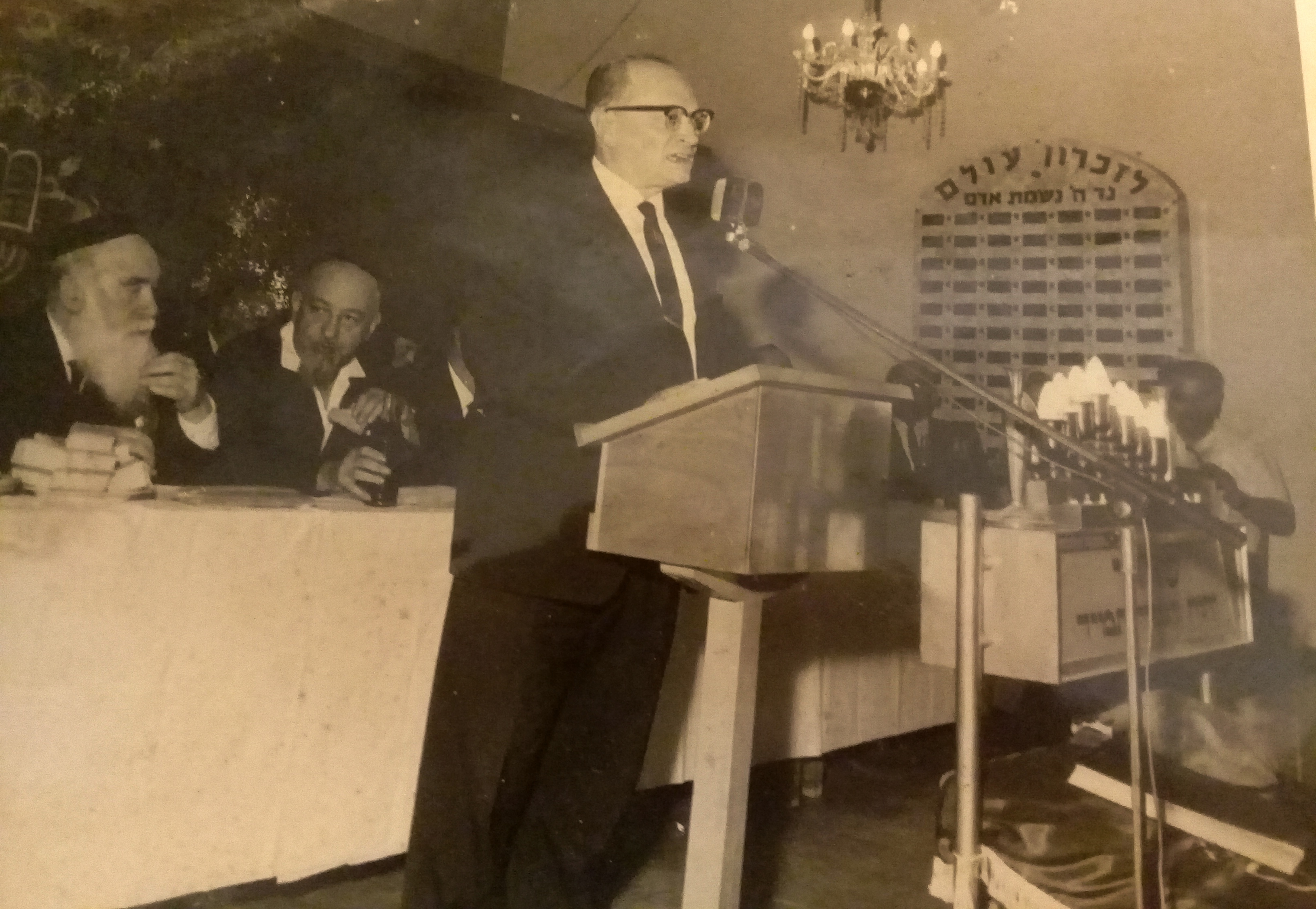 במרכז הנואם ישראל יצחק גרינץ בחנוכת בית כנסת בכפר סיטרין. באמצע סגן שר הפנים ישראל שלמה בן-מאיר משמאל הרב מרדכי פוגלמן רבה של קריית מוצקים. מוצקין